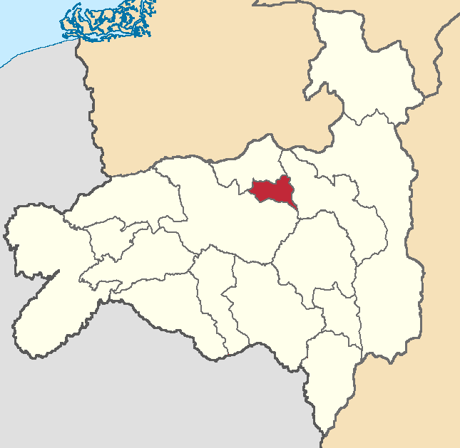 Mapa localizador del cantón en Loja, Ecuador